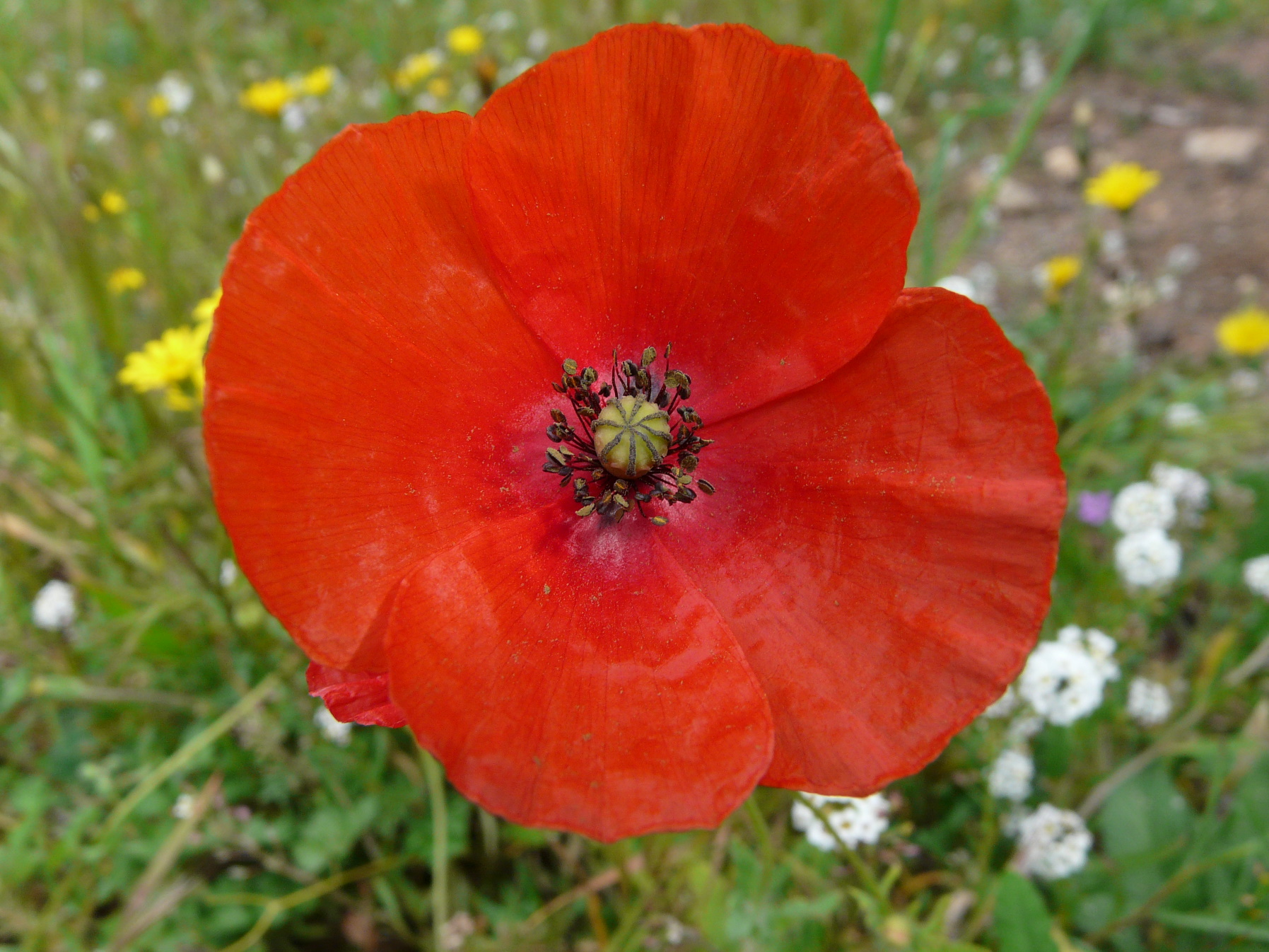 coquelicot